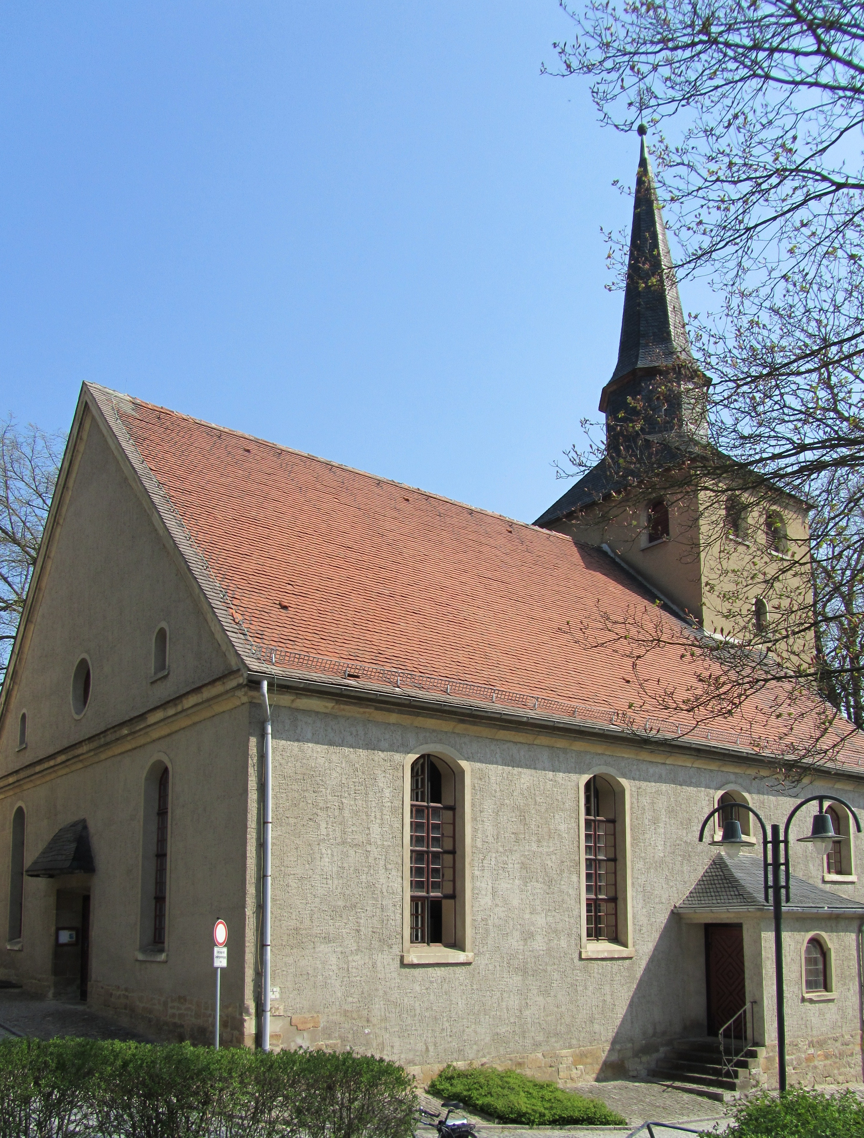 Die Stadtkirche von Eckartsberga (Sachsen-Anhalt).